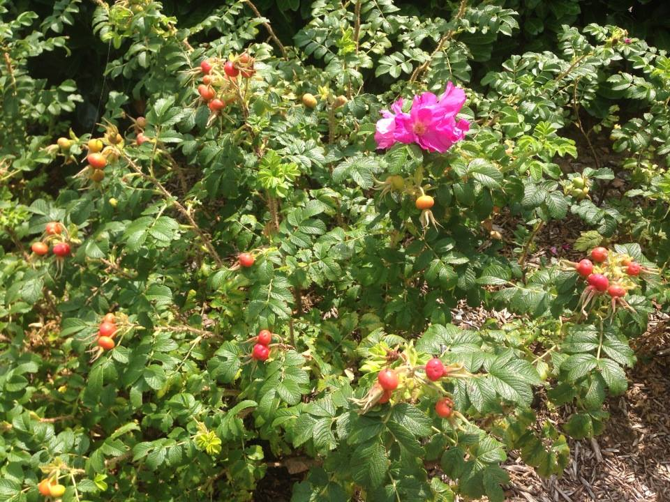 Remontance sur Rosa rugosa